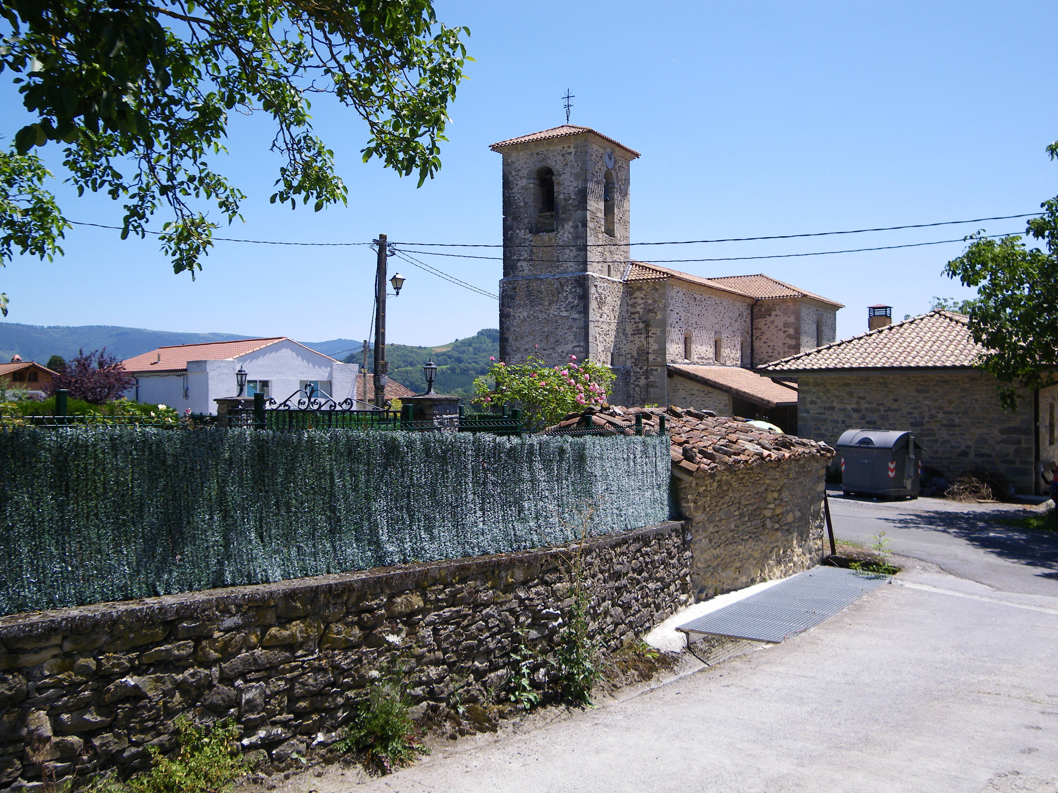 San Julian eliza, Erripa herrian, Izoria, Aiara, Araba, Euskal Herria.